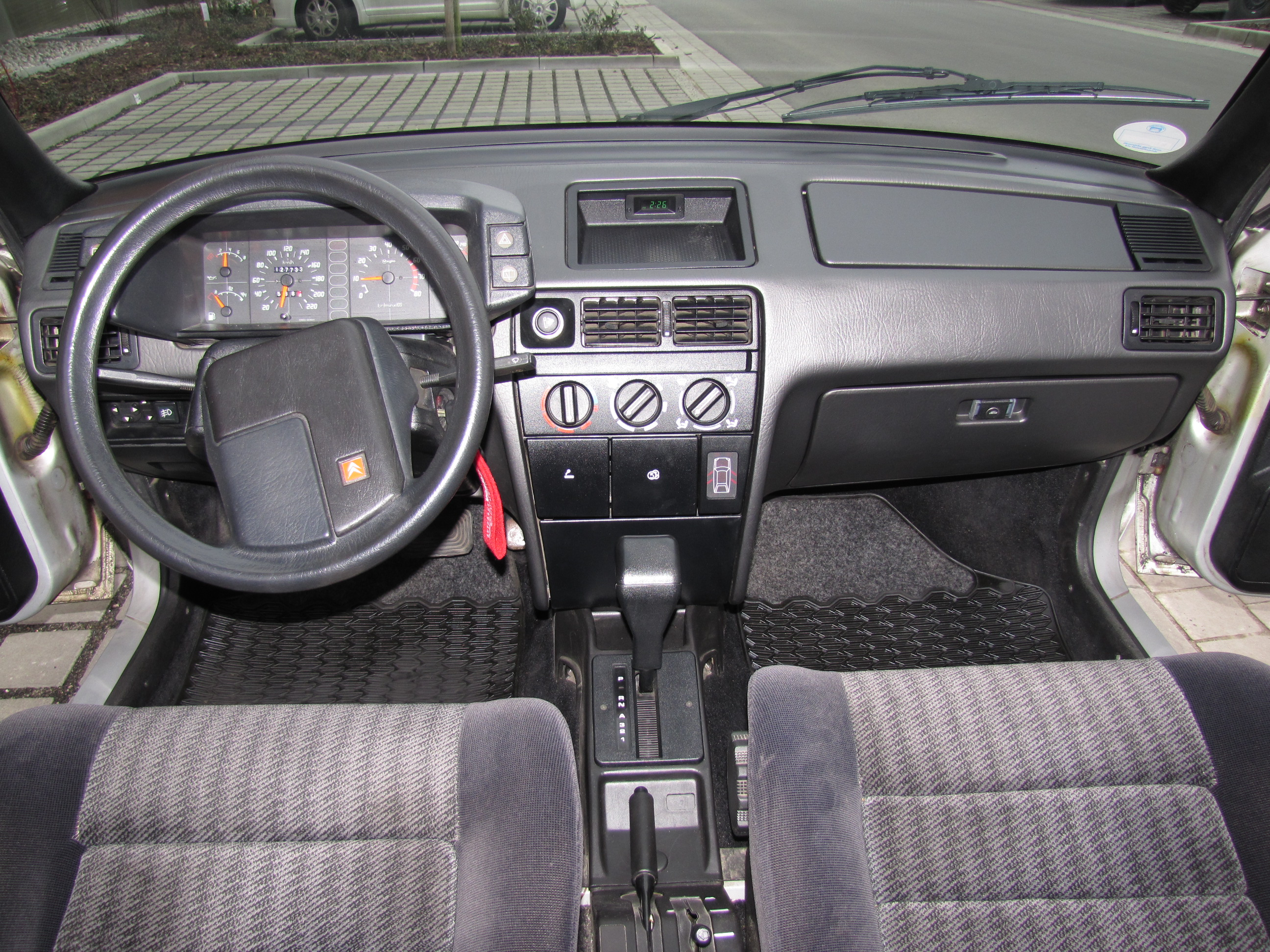 Citroen BX 19 GTi, Bj. 1990, mit dem seltenen ZF-Automatik-Getriebe